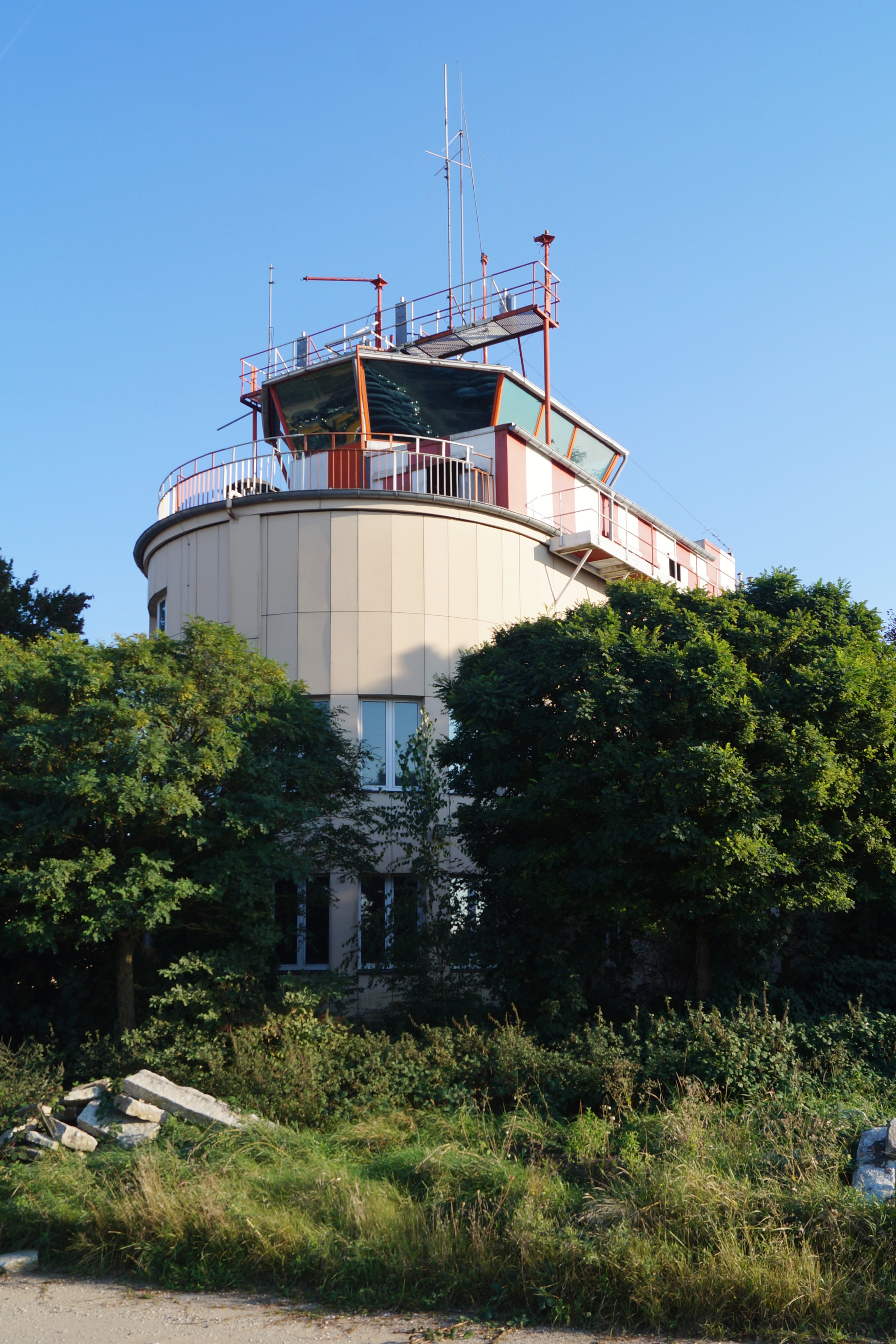 Leer stehendes Towergebäude des Fliegerhorstes Erlensee-Langendiebach, Hessen, ehemals Hanau Army Airfield, Ansicht von Nordwesten.